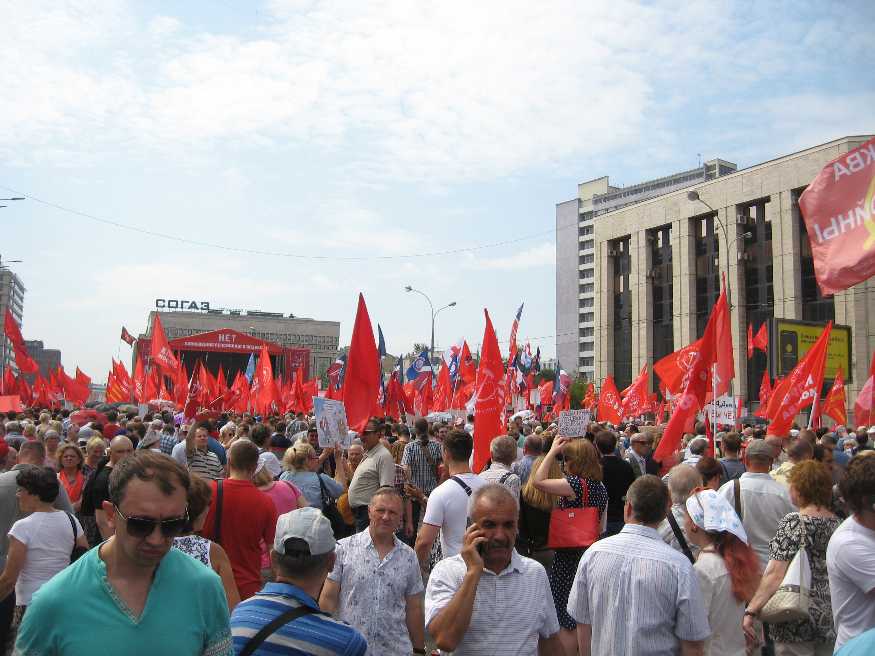 Митинг протеста против намечаемого увеличения пенсионного возраста, участвовали (пришли и выступали) представители различных организаций, партий, профсоюзов, общественных объединений. Организован КПРФ, проводился в Москве 28.07.2018 (фото) и других городах. Участники требовали отмены повышения пенсионного возраста, отставки правительства и президента.